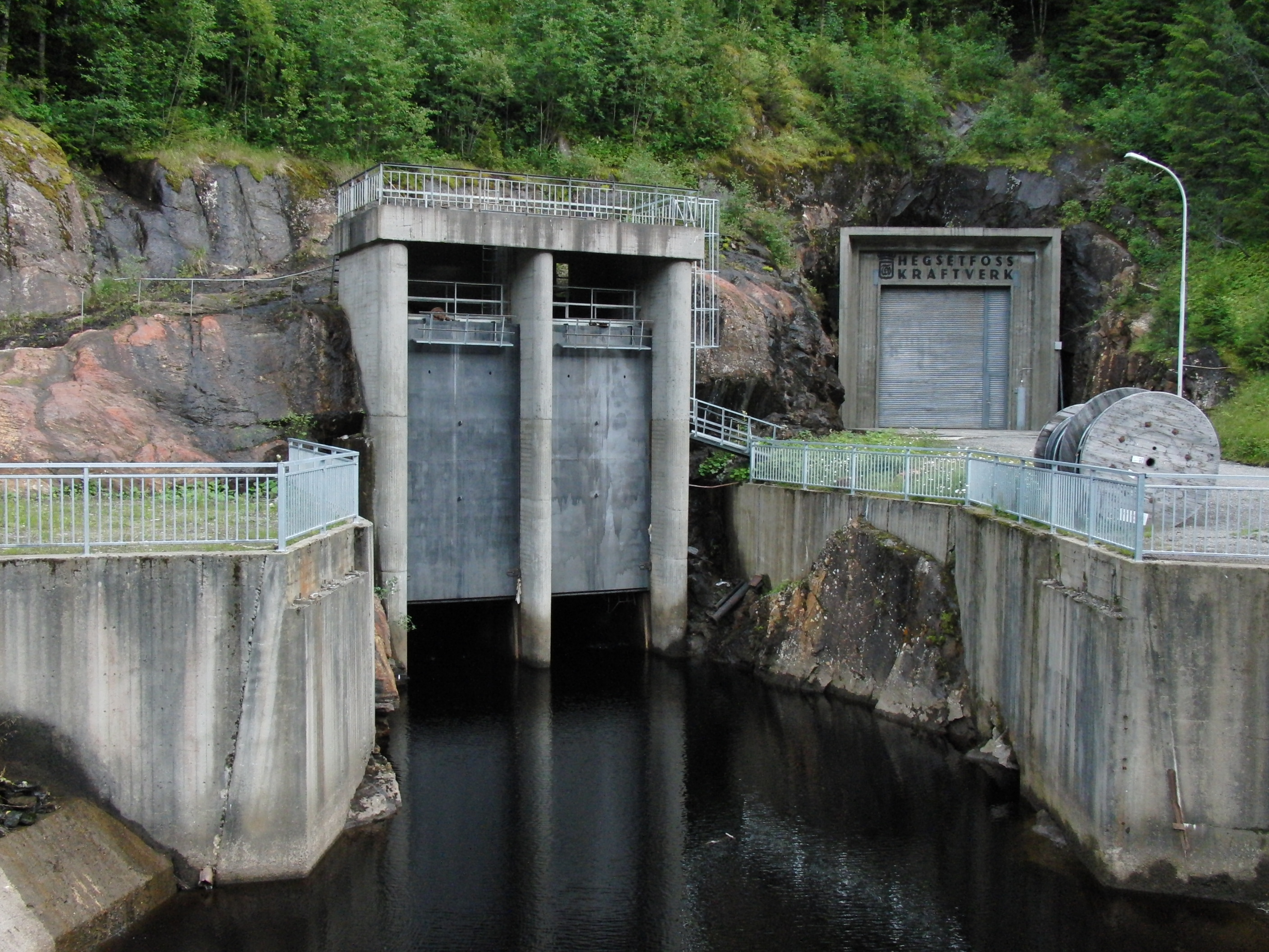 Hegsetfoss kraftverk